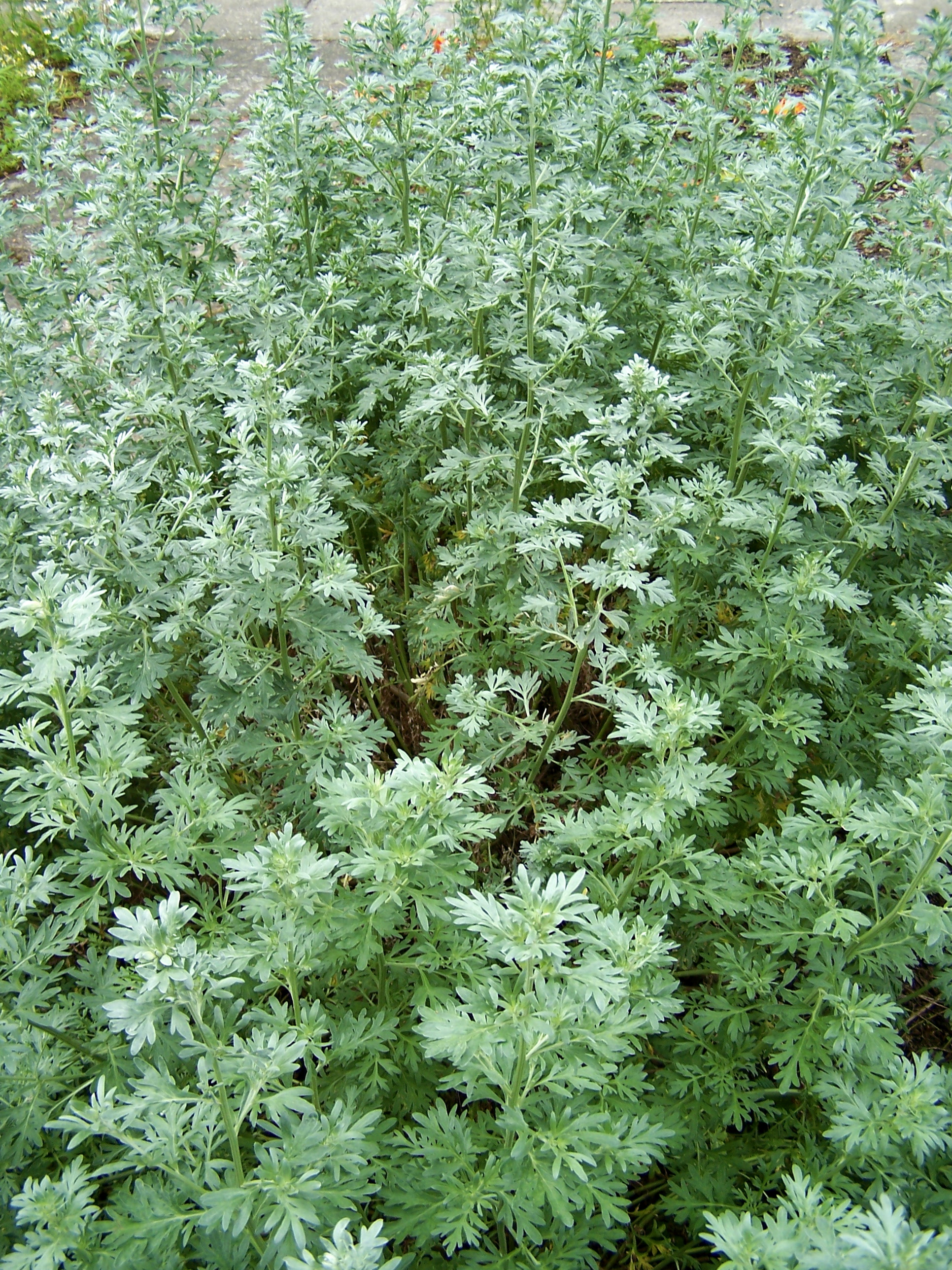 Artemisia absinthium 17 juin 2006 Vieux jardin botanique de Göttingen